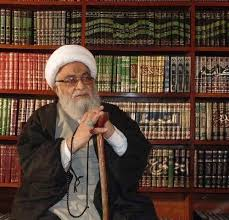 استاد العلمأ کی یادگار تصویر